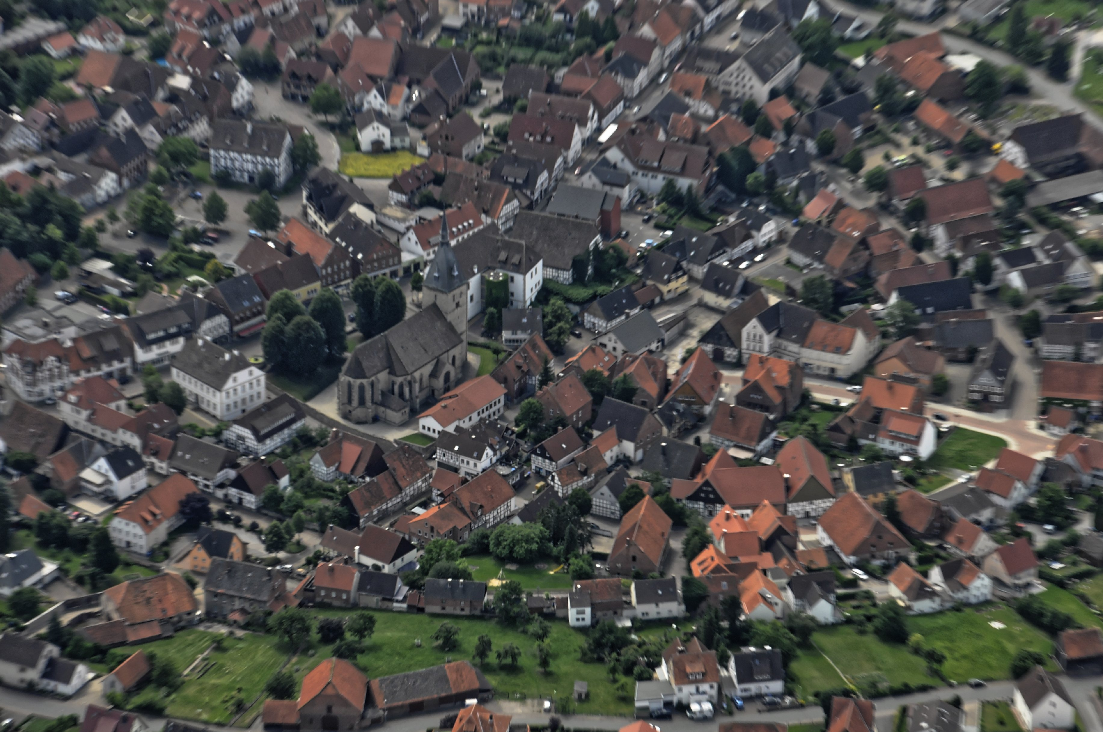 Bilder vom Flug Nordholz-Hammelburg 2015: Stadtzentrum von Nieheim